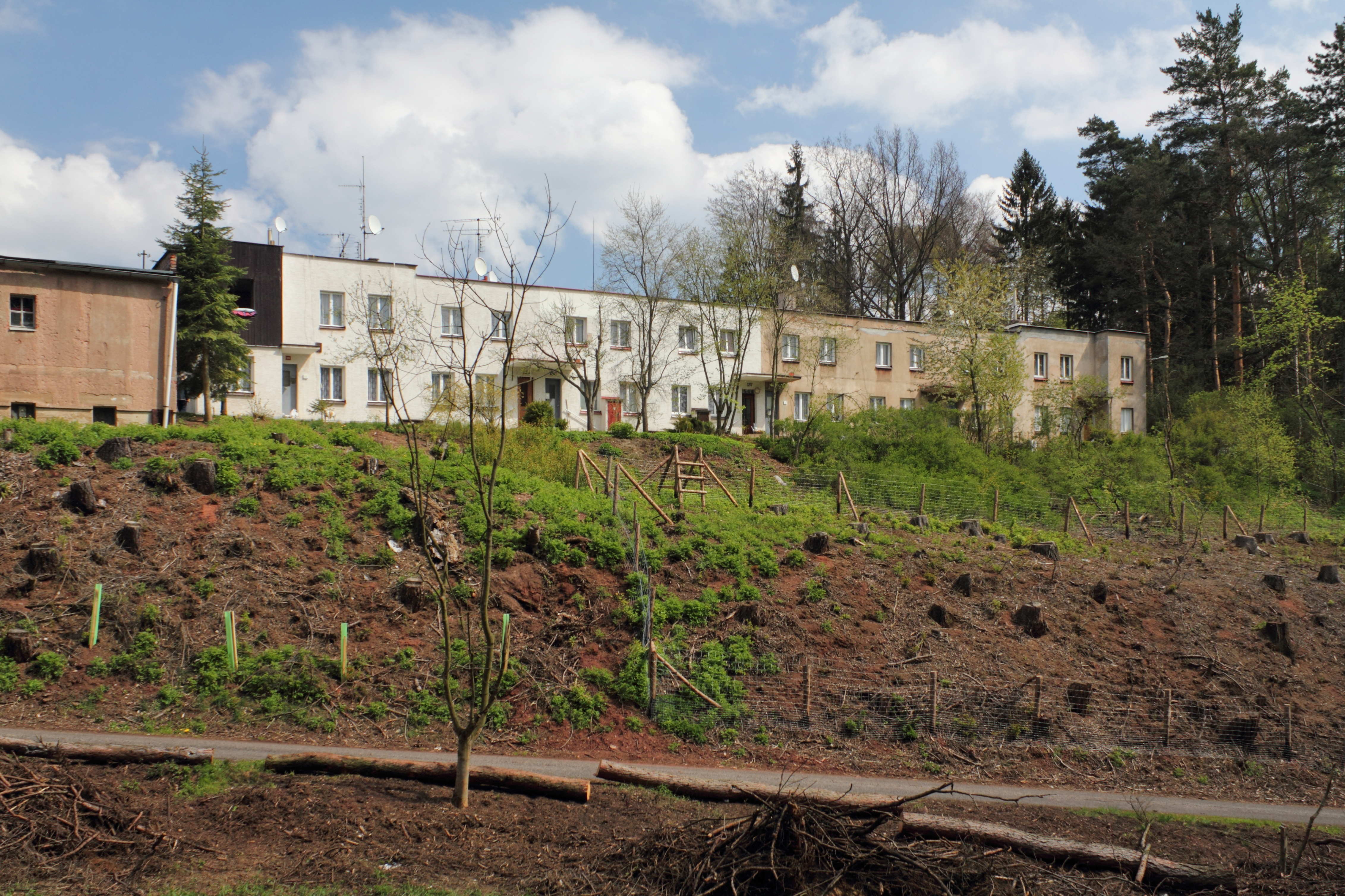 Dělnická kolonie architekta Adolfa Loose v Babí (Náchod)